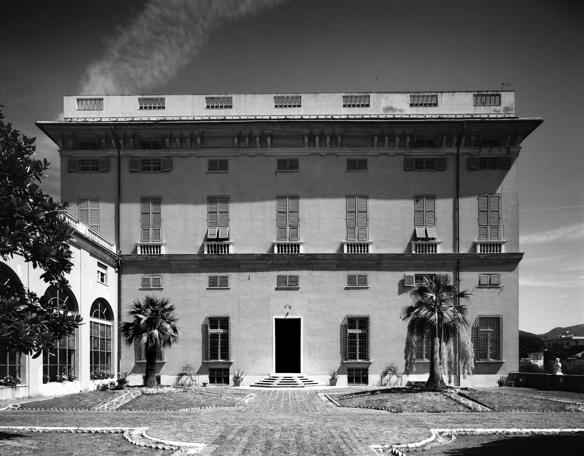 La villa Brignole Sale è una storica dimora nobiliare di Genova che si trova nel quartiere di Albaro, venne realizzata all'inizio del Seicento